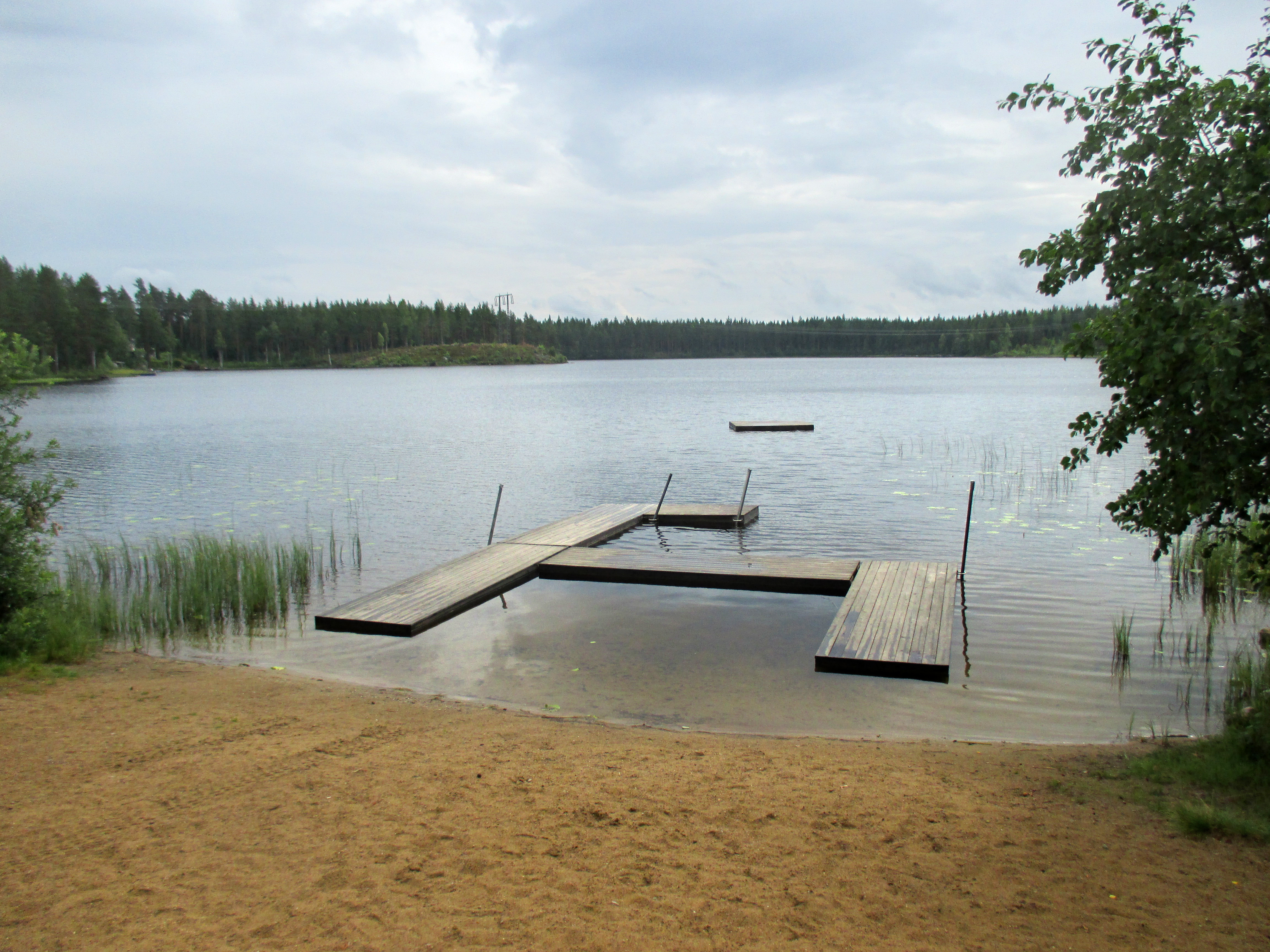 Lissrännsjön söder om Ulvsta i Ockelbo kommun, Gästrikland, Gävleborgs län, Sverige. Lissrännsjön avvattnas av Rännsjöbäcken, som i sin tur rinner ut i Testeboån strax uppströms Bysjön.